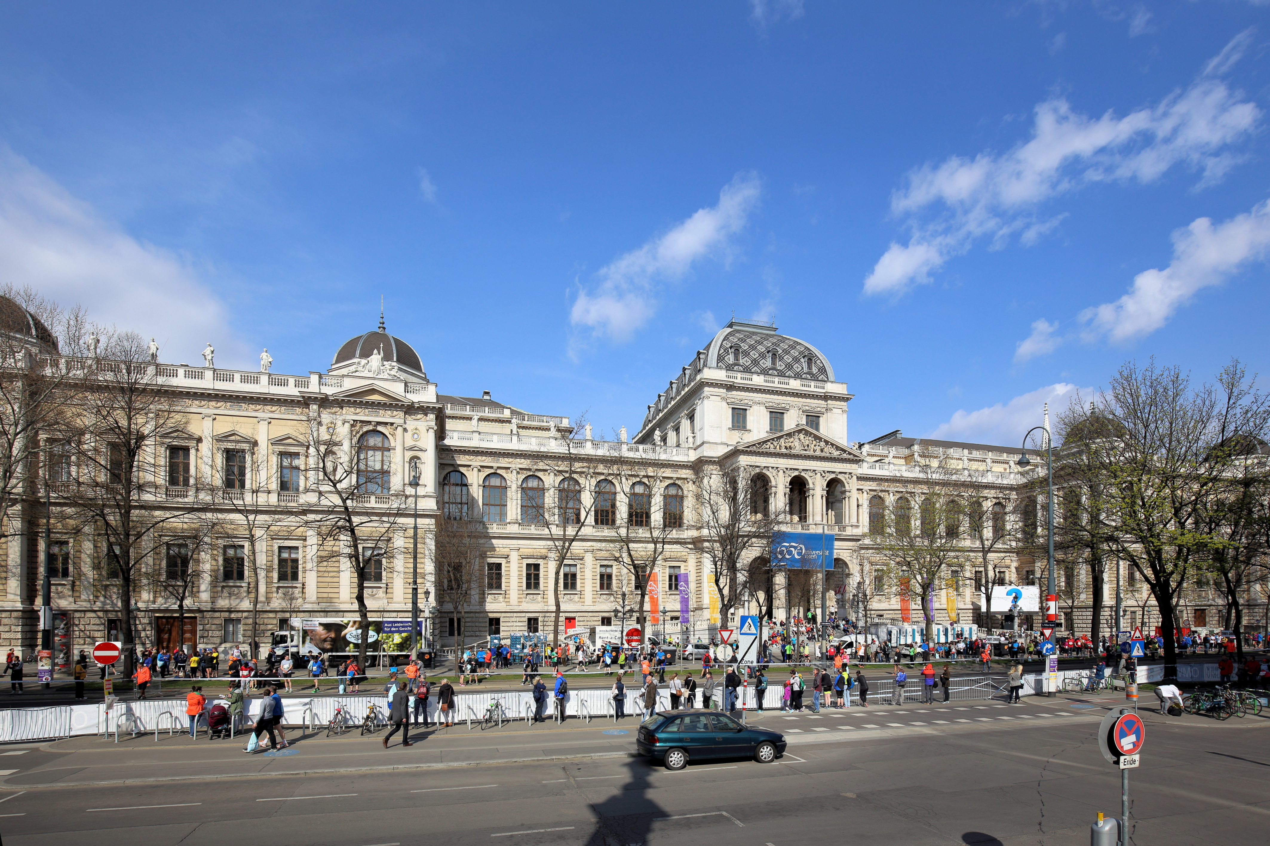 Fassade des Hauptgebäudes der Universität Wien am Universitätsring in der österreichischen Bundeshaupstadt Wien. Das Universitätsgebäude wurde von 1877 bis 1884 nach Plänen des Architekten Heinrich von Ferstel errichtet.